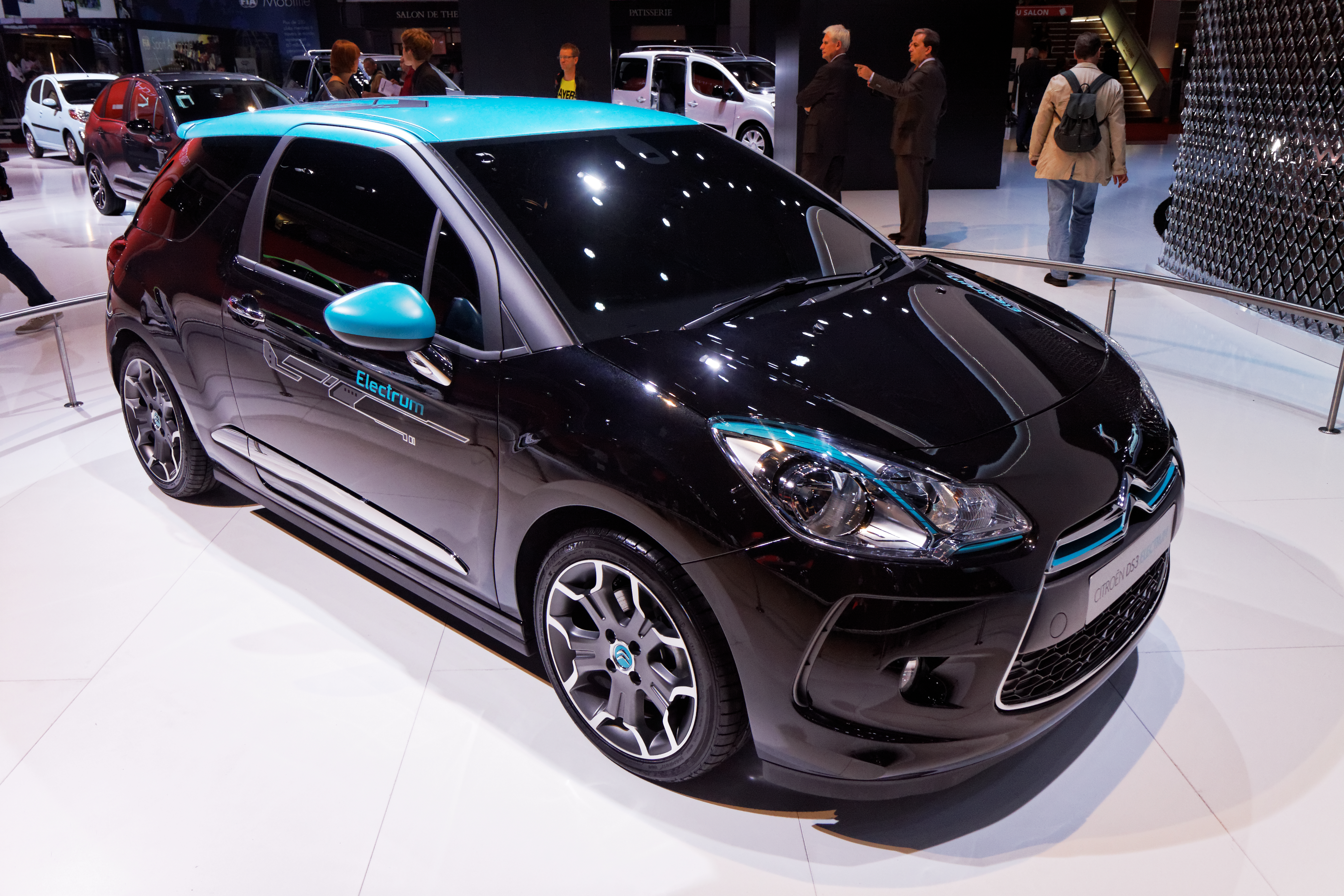 Une Citroën DS3 Electrum présentée lors du Mondial de l'Automobile de Paris 2012.